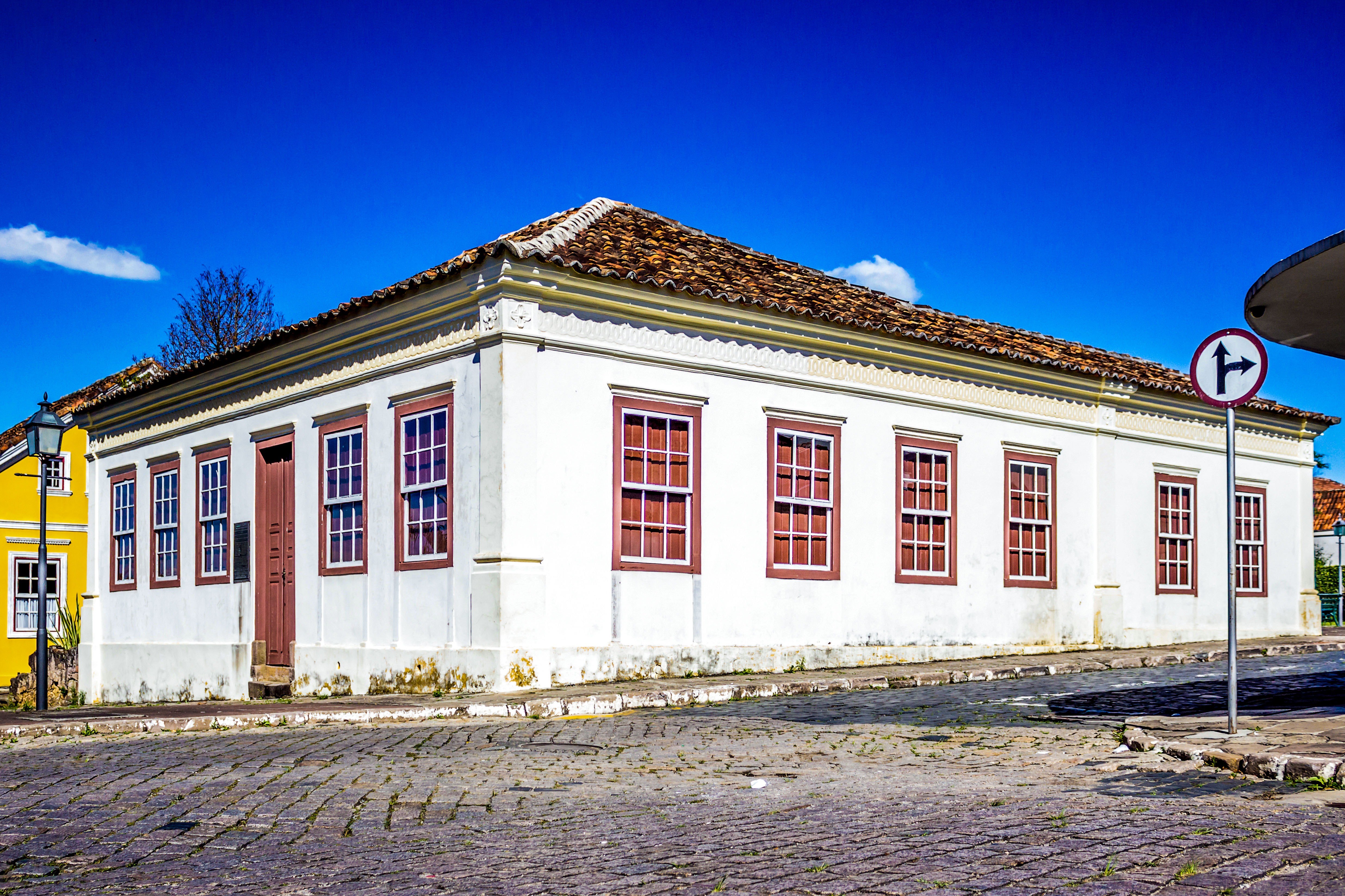 Lapa, PR: conjunto arquitetônico e paisagístico. Memorial Ney Braga, no Centro Histórico da cidade, exatamente na casa onde o político nasceu há 98 anos. O acervo do memorial é composto por fotos, medalhas, placas e diplomas que fazem parte do arquivo pessoal de Nice Braga, viúva de Ney Braga.